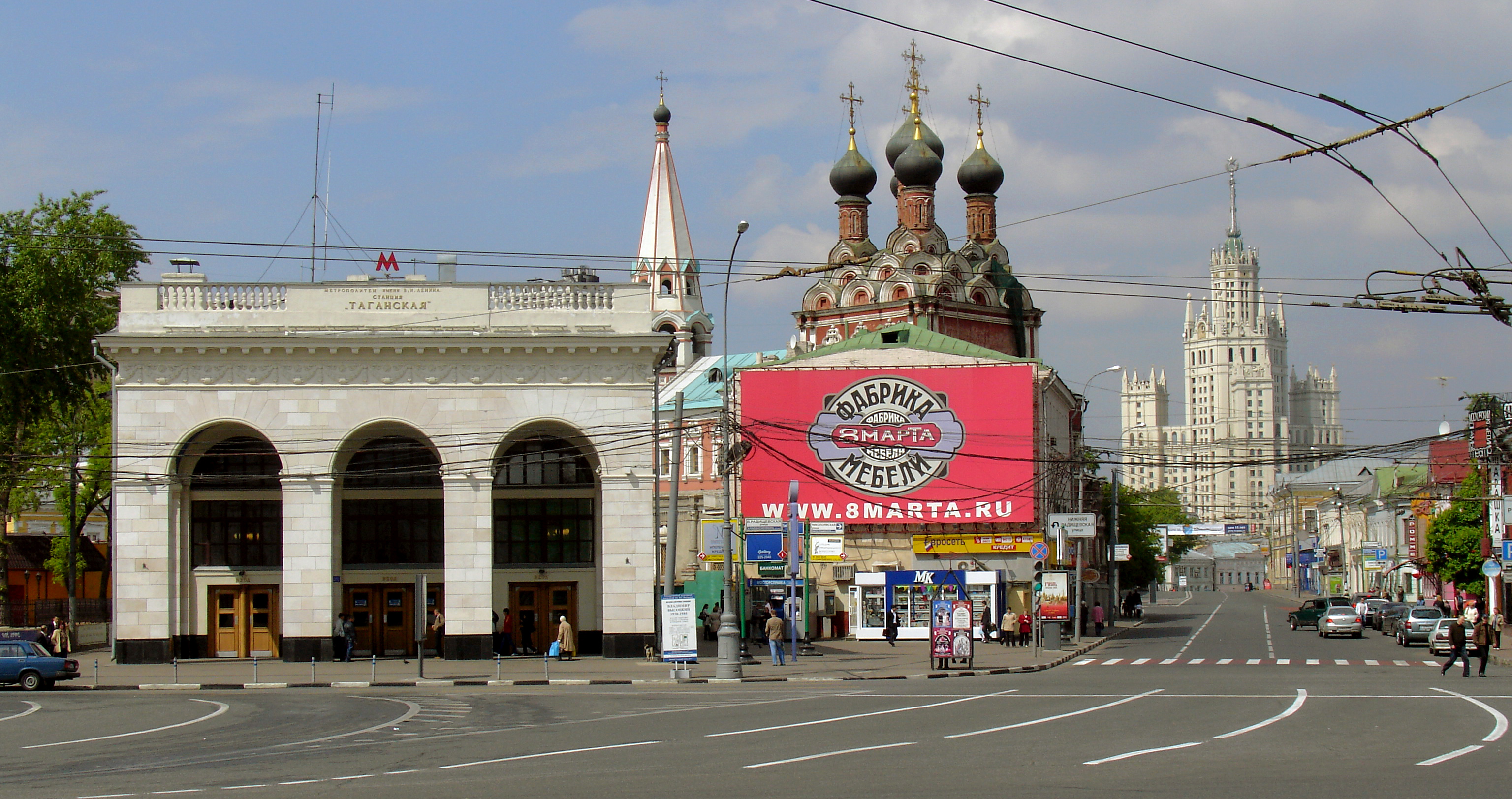 Таганская площадь. Вестибюль станции Московского метро Таганская Кольцевая